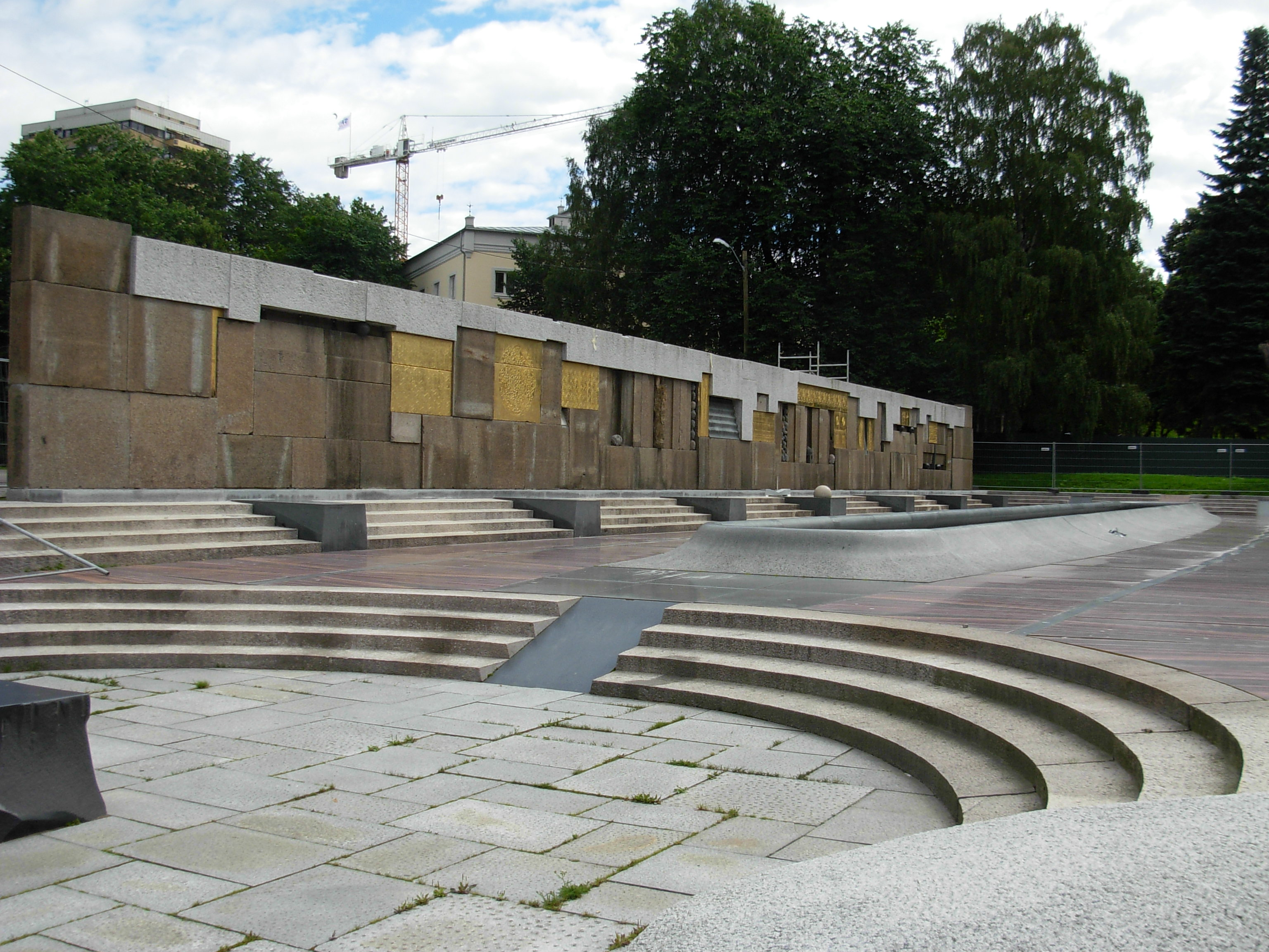 Den flerkulturelle plass, Klosterenga skulpturpark, Grønland, Oslo